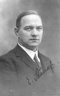 Eduard Aunap